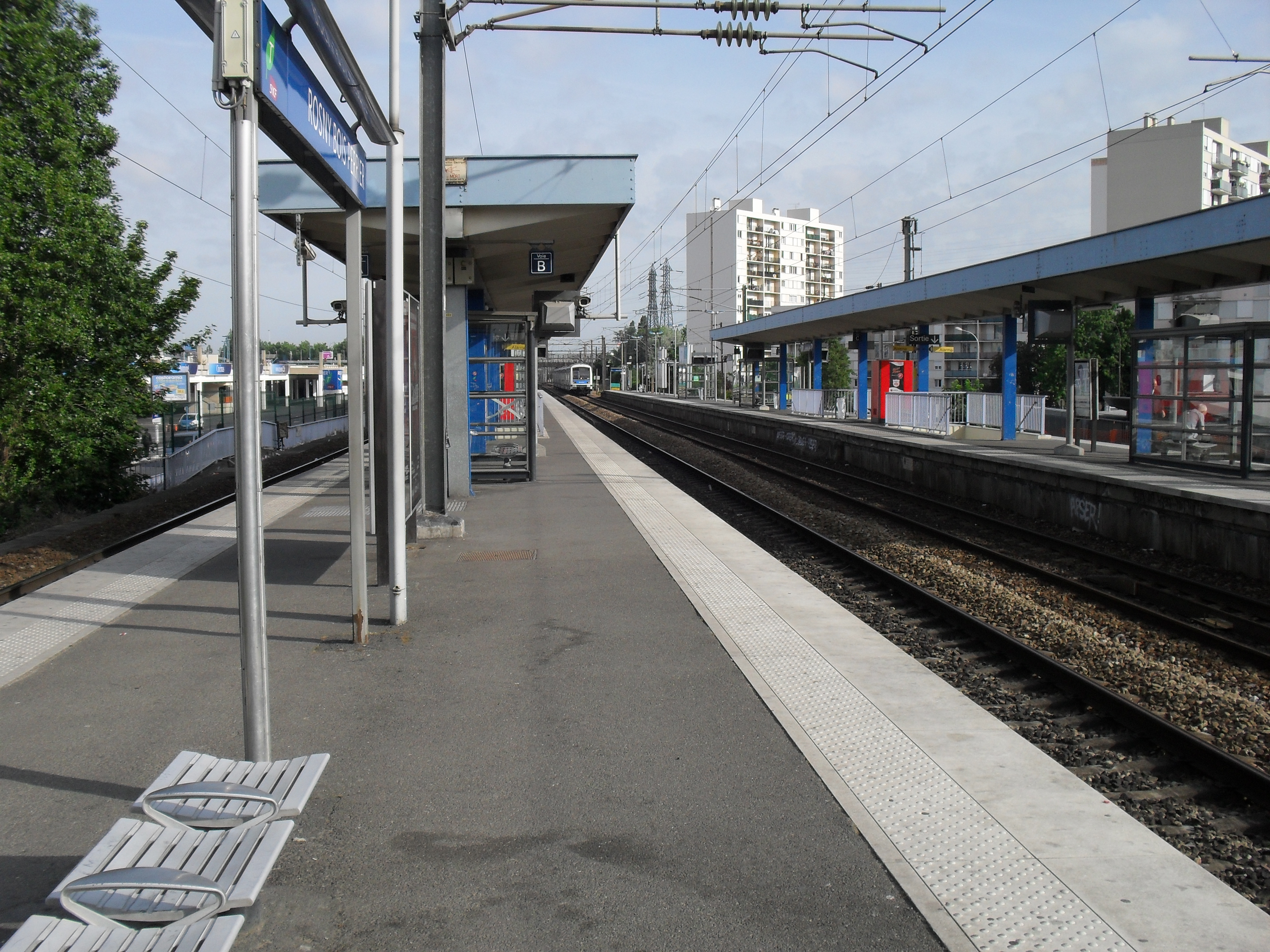 RER E - Gare de Rosny-Bois-Perrier